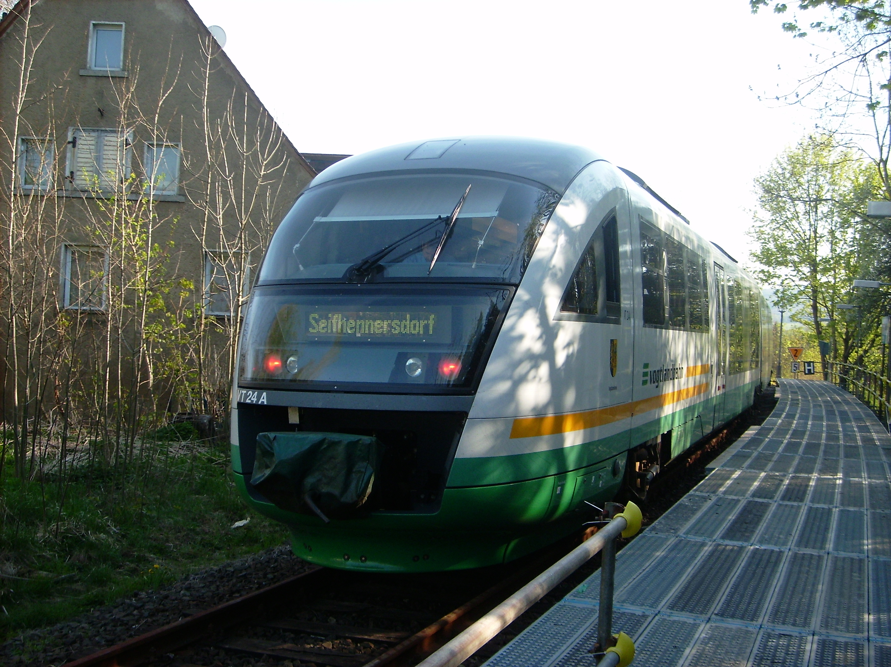 Vorderansicht eines Trilex (TLX) der Vogtlandbahn im Haltepunkt Seifhennersdorf